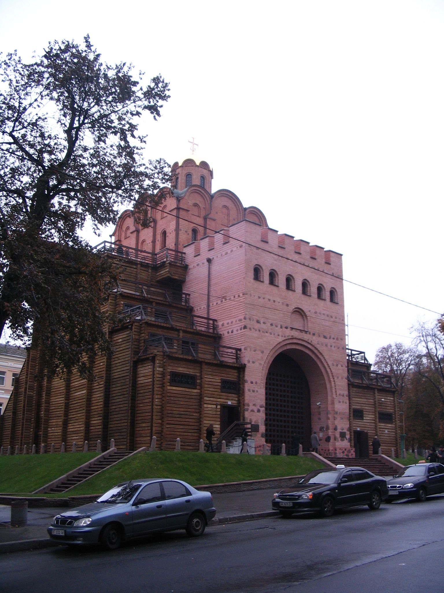 Golden Gate, Kiev